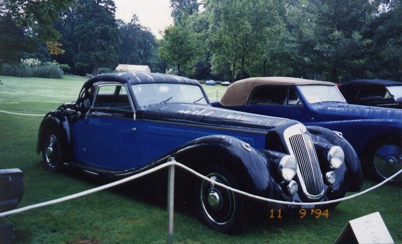 Lancia Astura 1938 Pourtout - Concours Bagatelle 1994. Vendue à Monaco (Bonhams) en 2005 pour 324.000 €.